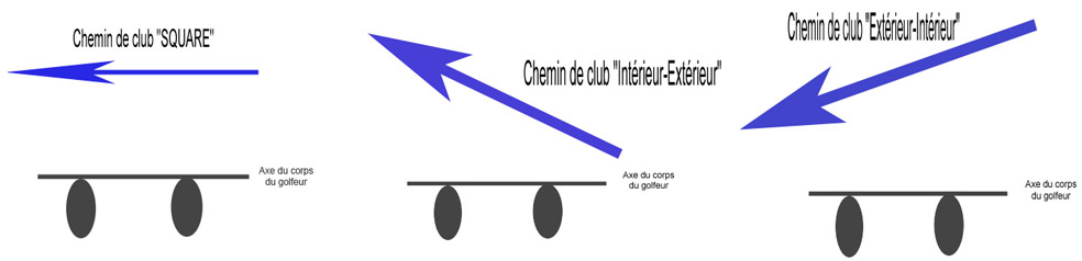 Type de chemin du club de golf